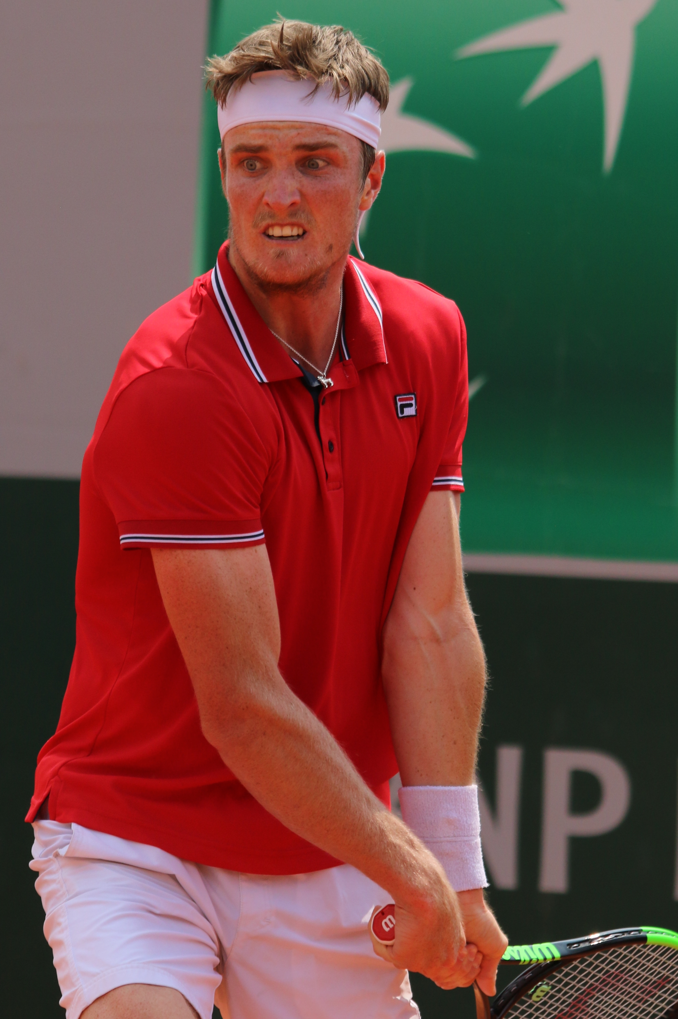 Torpegaard RGQ19 (14)